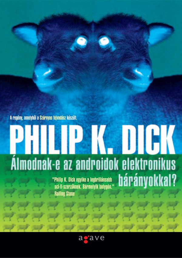 Philip K. Dick Álmodnak-e az androidok elektronikus bárányokkal? című könyvének borítója, második magyar kiadás